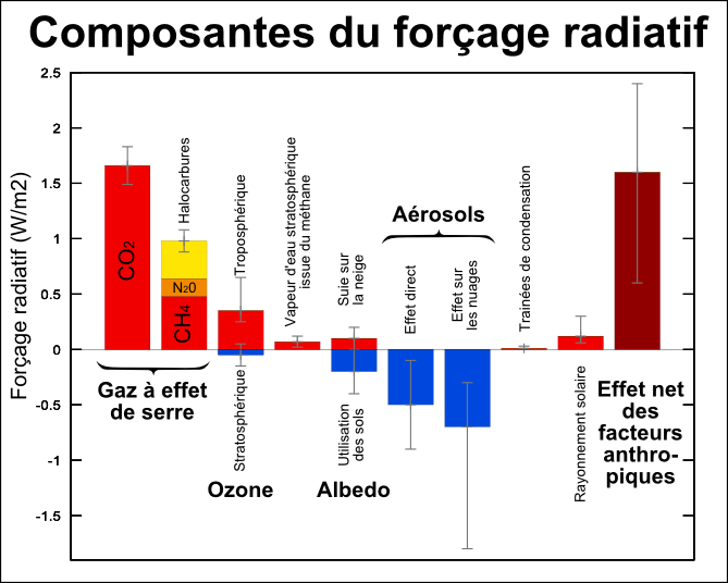 Forcage radiatif lié au réchauffement climatique. Les segments superposés à chaque barre de l'histogramme indique les marges d'erreur.